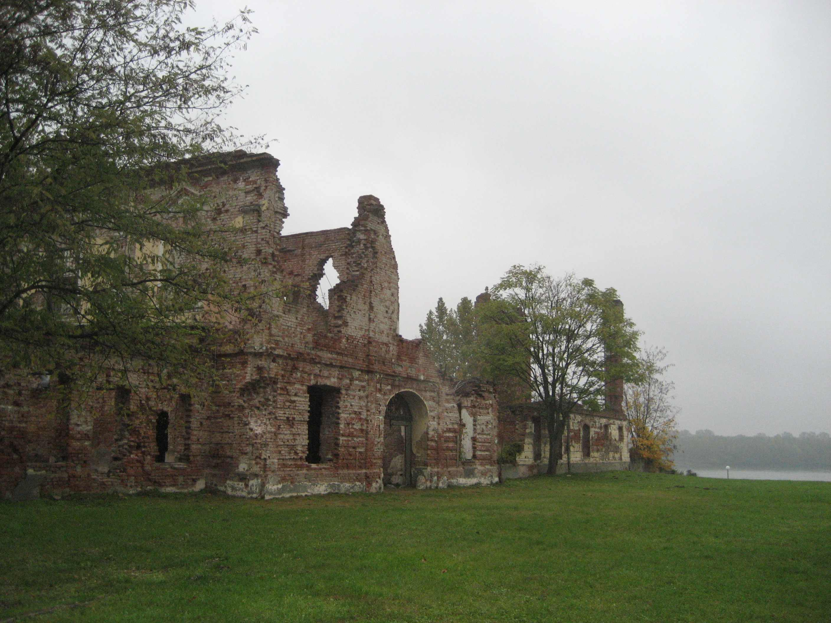 Castle Eltz, Vukovar